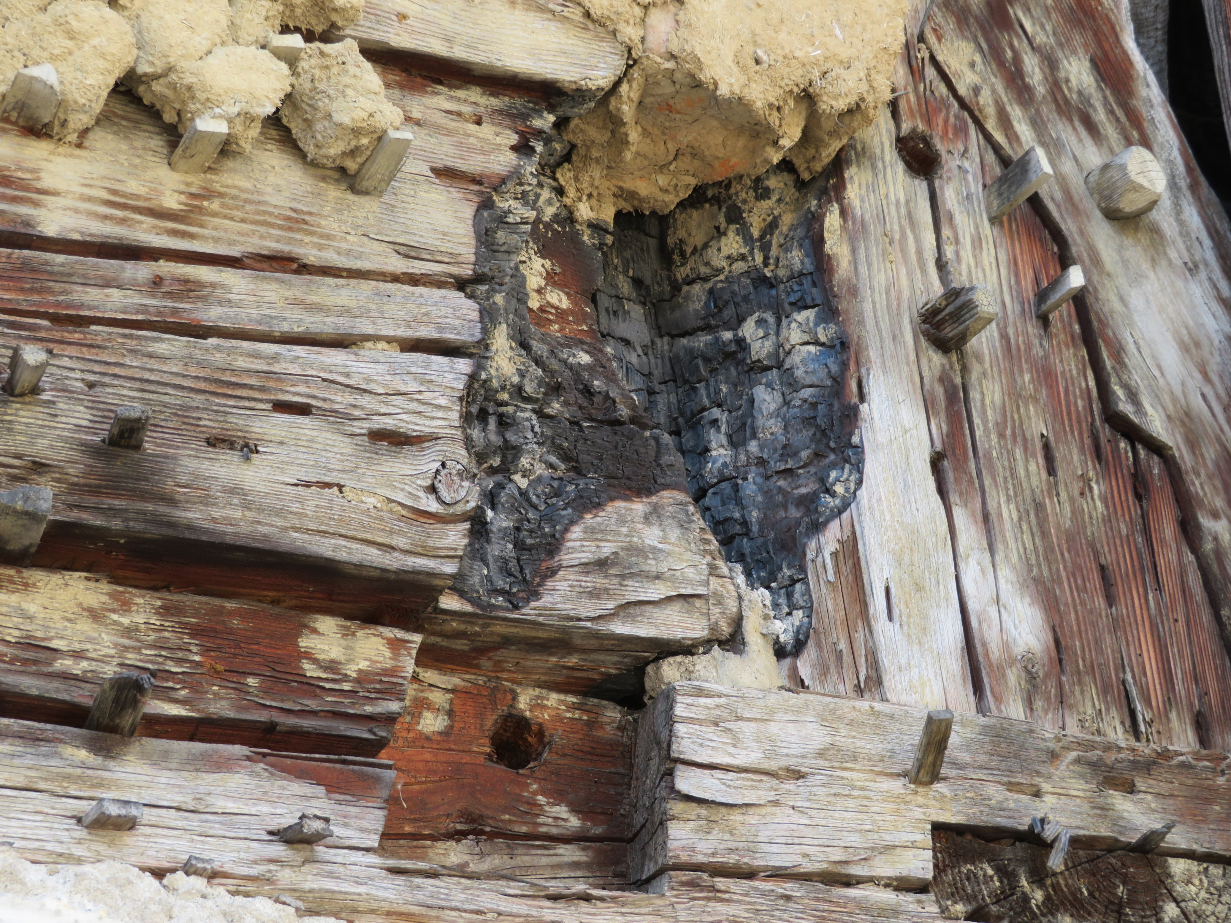 Brandschaden am Möggenriedhaus, Aufnahme von 2017